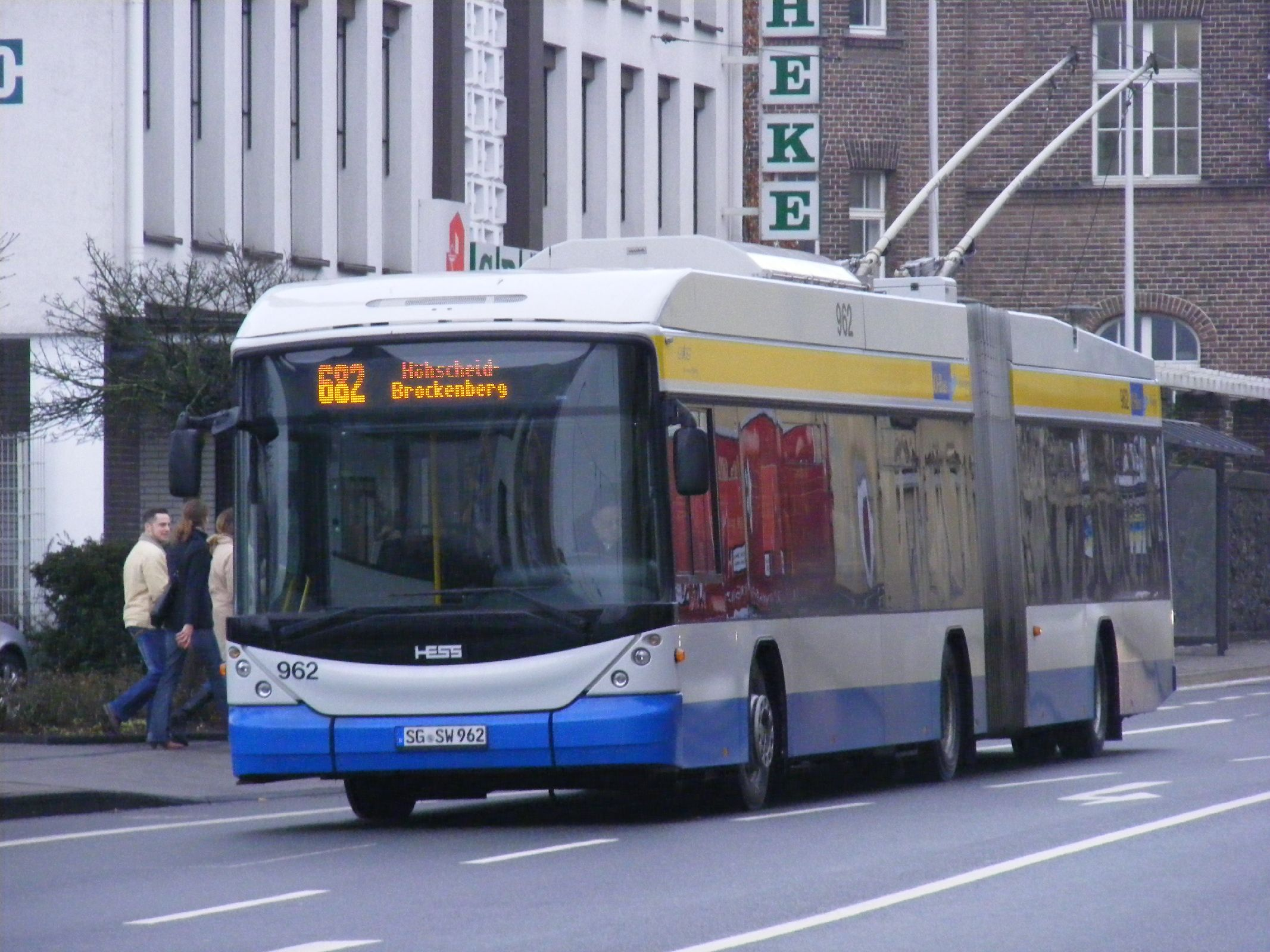 Stadtwerke Solingen Hess Trolleybus 962, SG-SW 962.